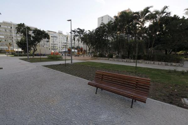 Urbanismo da Praça Antero de Quental.